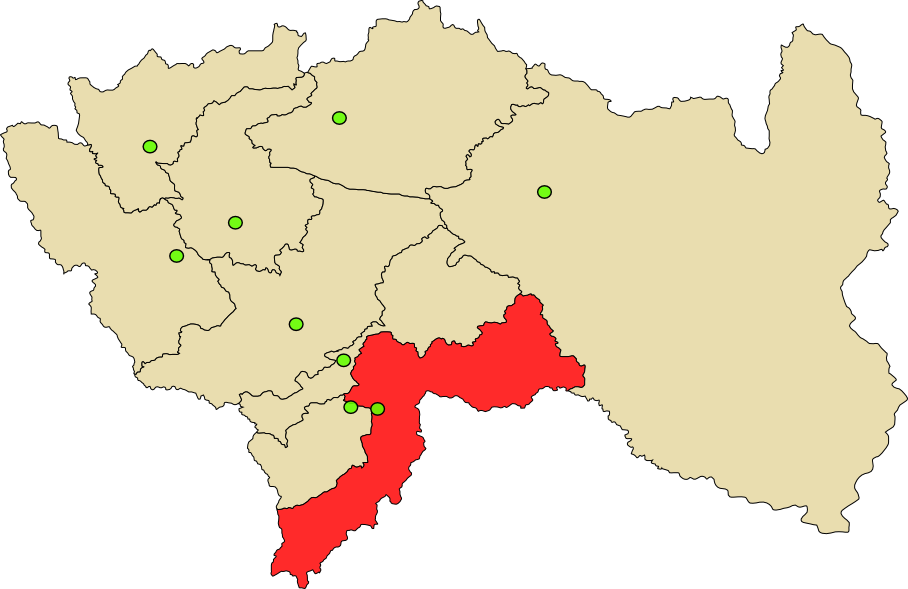 Mapa de Provincia de Huancayo en Perú